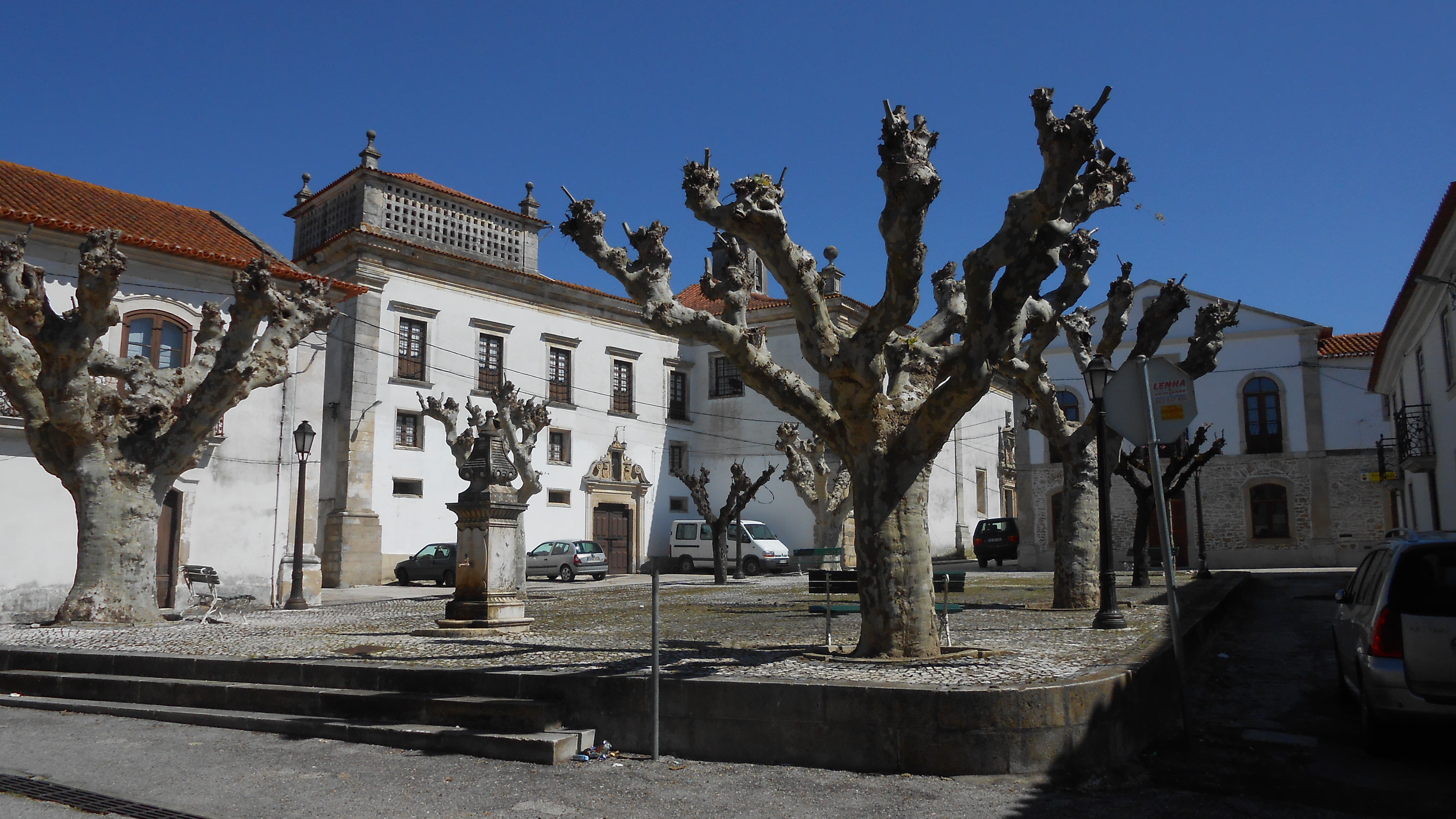 Praça do Rossio, der zentrale Platz im historischen Tentúgal